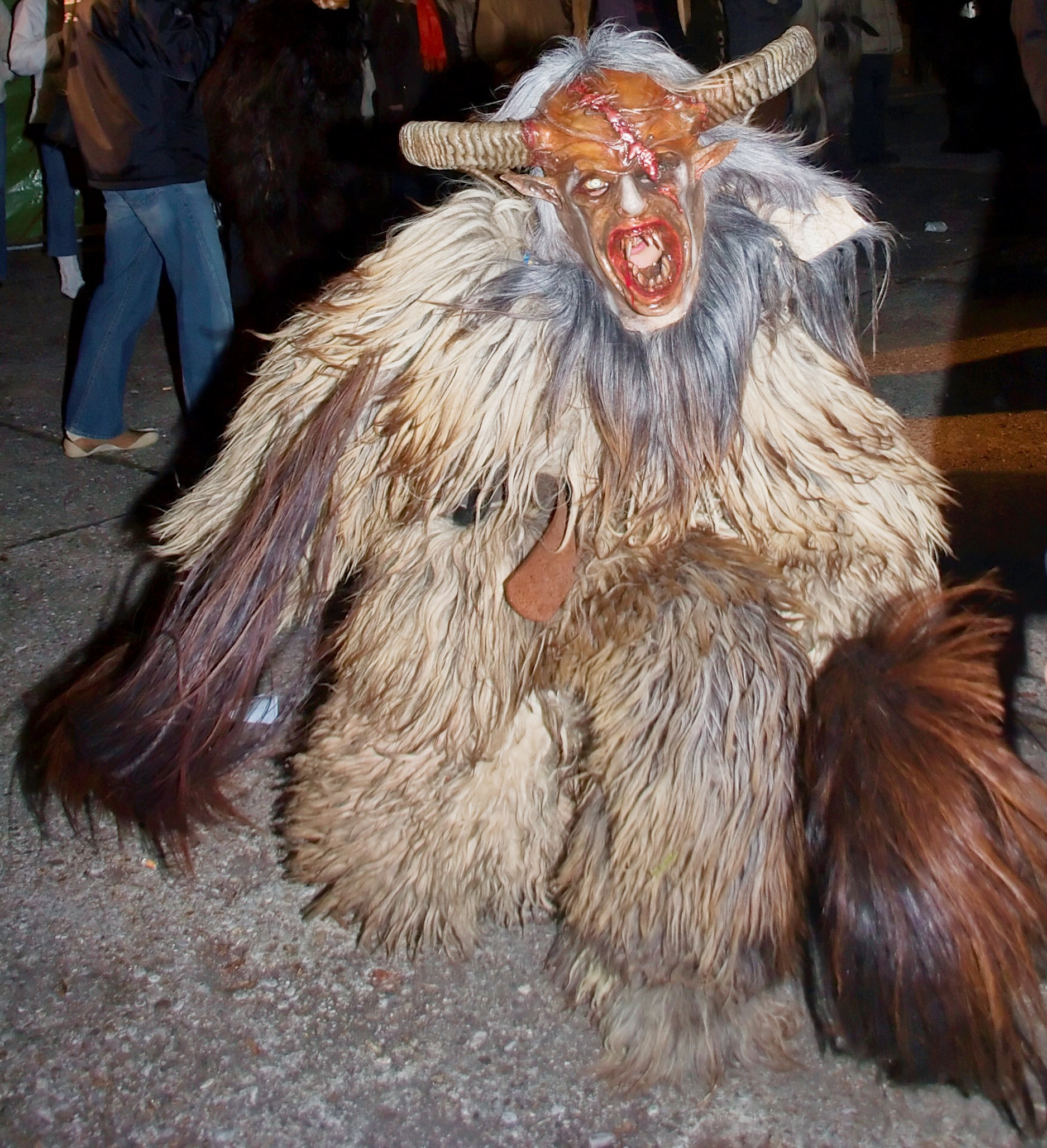 Krampus of Morzger Pass in Salzburg Austria